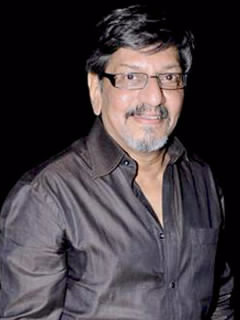 Amol Palekar at Mugdha Godse and Shabana Azmi at Maharashtra Day celebration